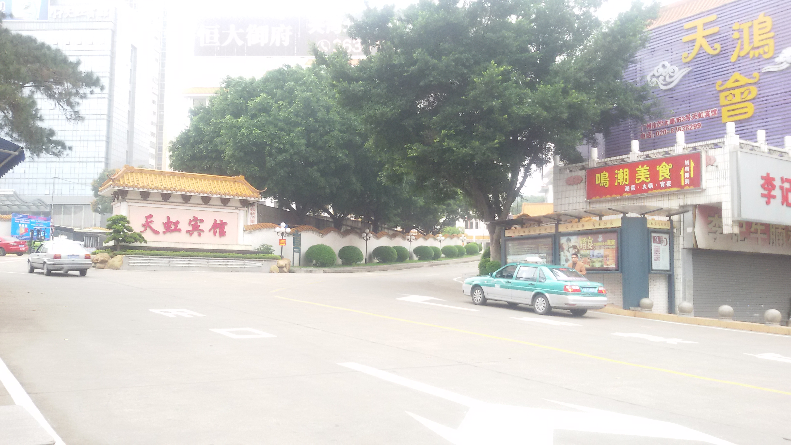 粵語: 广州天虹宾馆